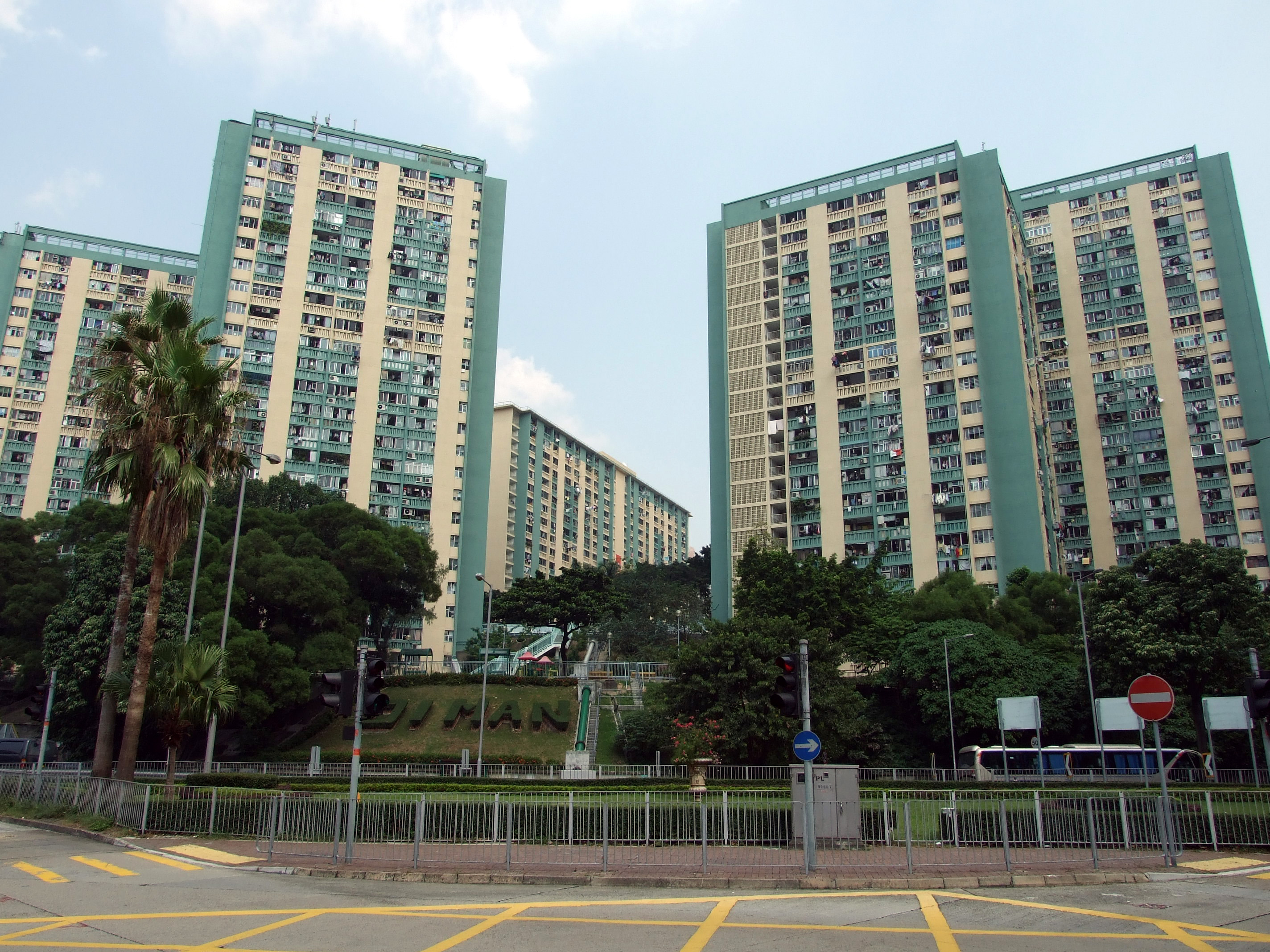 中文（香港）: 愛民邨